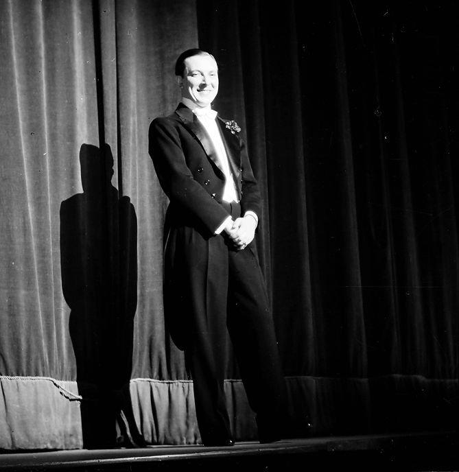 Kabarett der Komiker: „Die Nacht des Komikers Hugo Fischer-Köppe“; Erich Fiedler konferiert